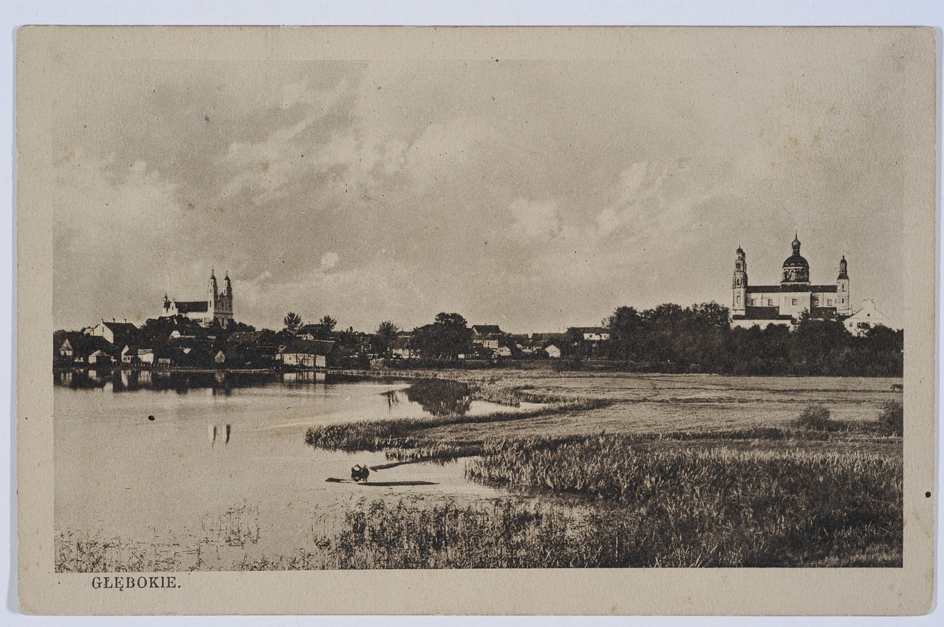 Беларуская (тарашкевіца): Глыбокае (Hłybokaje), з боку возера Кагальнае (Kahalnaje)